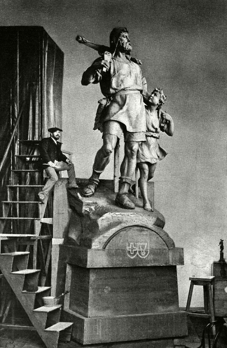 Richard Kissling (1848–1919) Bildhauer, Tell-Denkmal, 1892